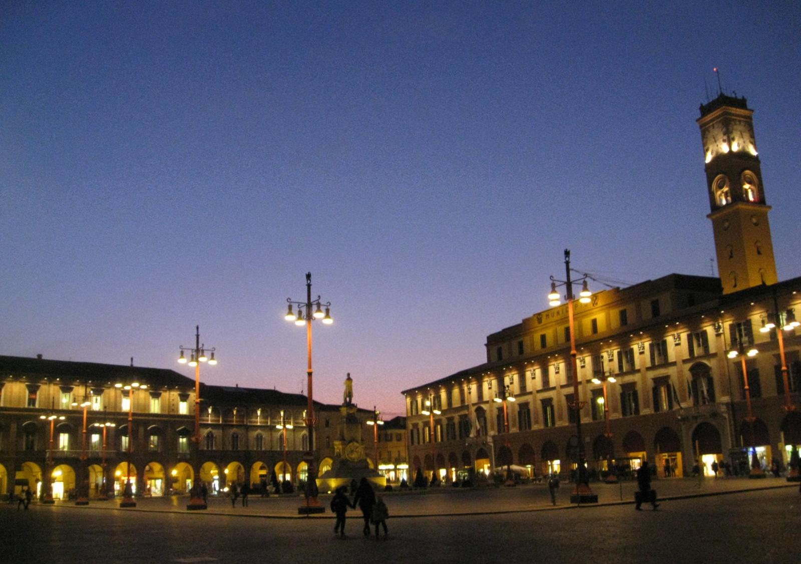 Forlì, piazza Saffi al tramonto.